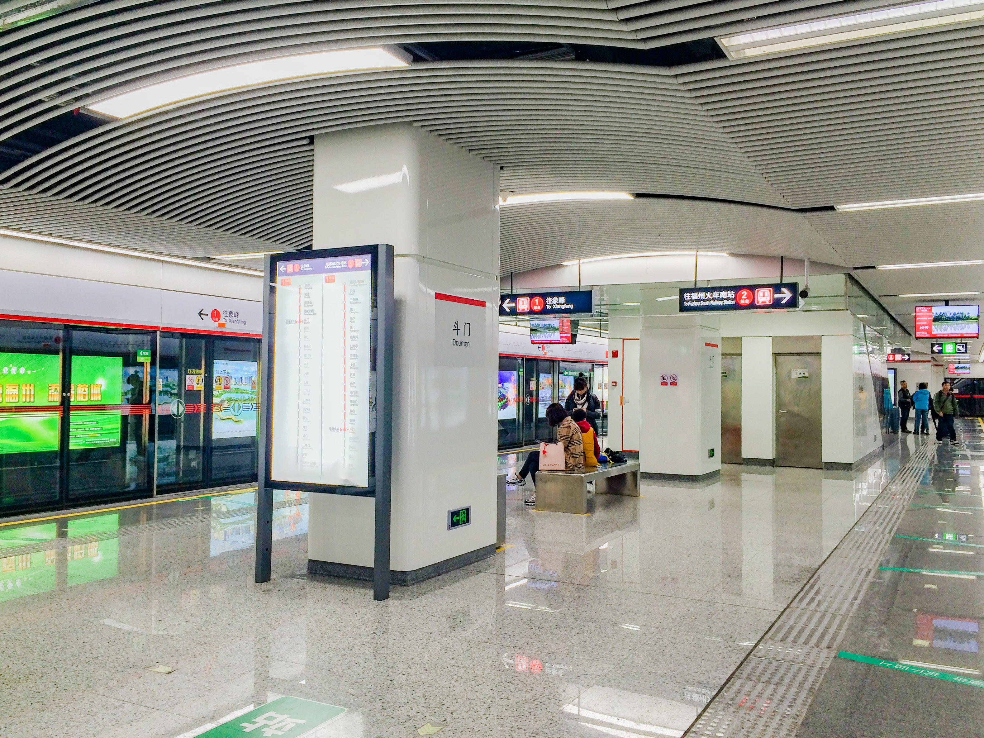 中文（中国大陆）: 斗门站站台